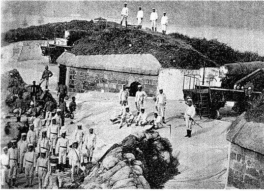 Taiwan old amy (Japan)in 1897 zn:台灣混成旅團